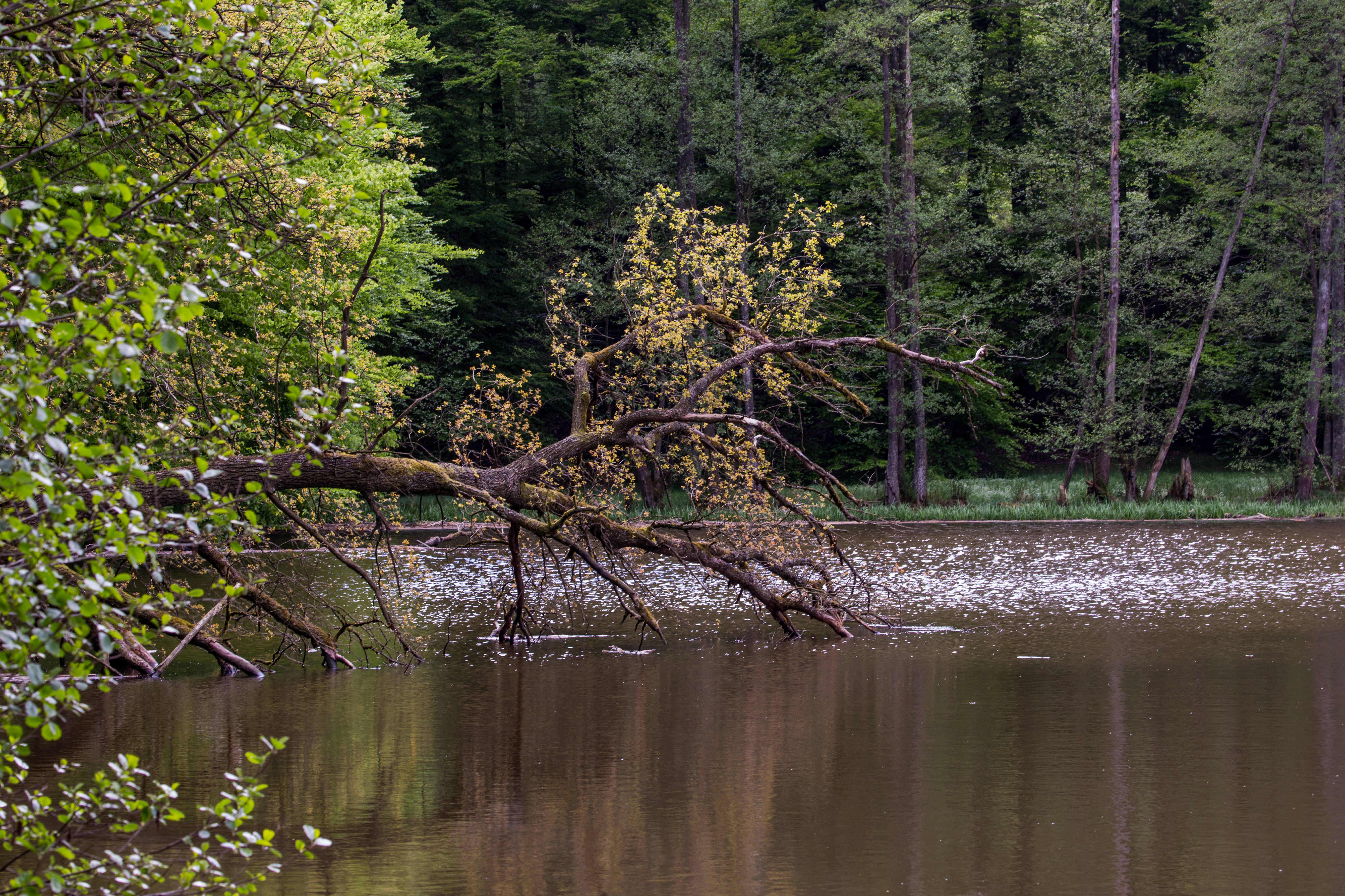 (NSG:BW-1.258)_Muckental